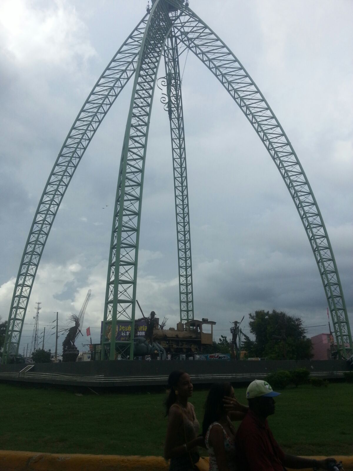 Monumento a la Cultura